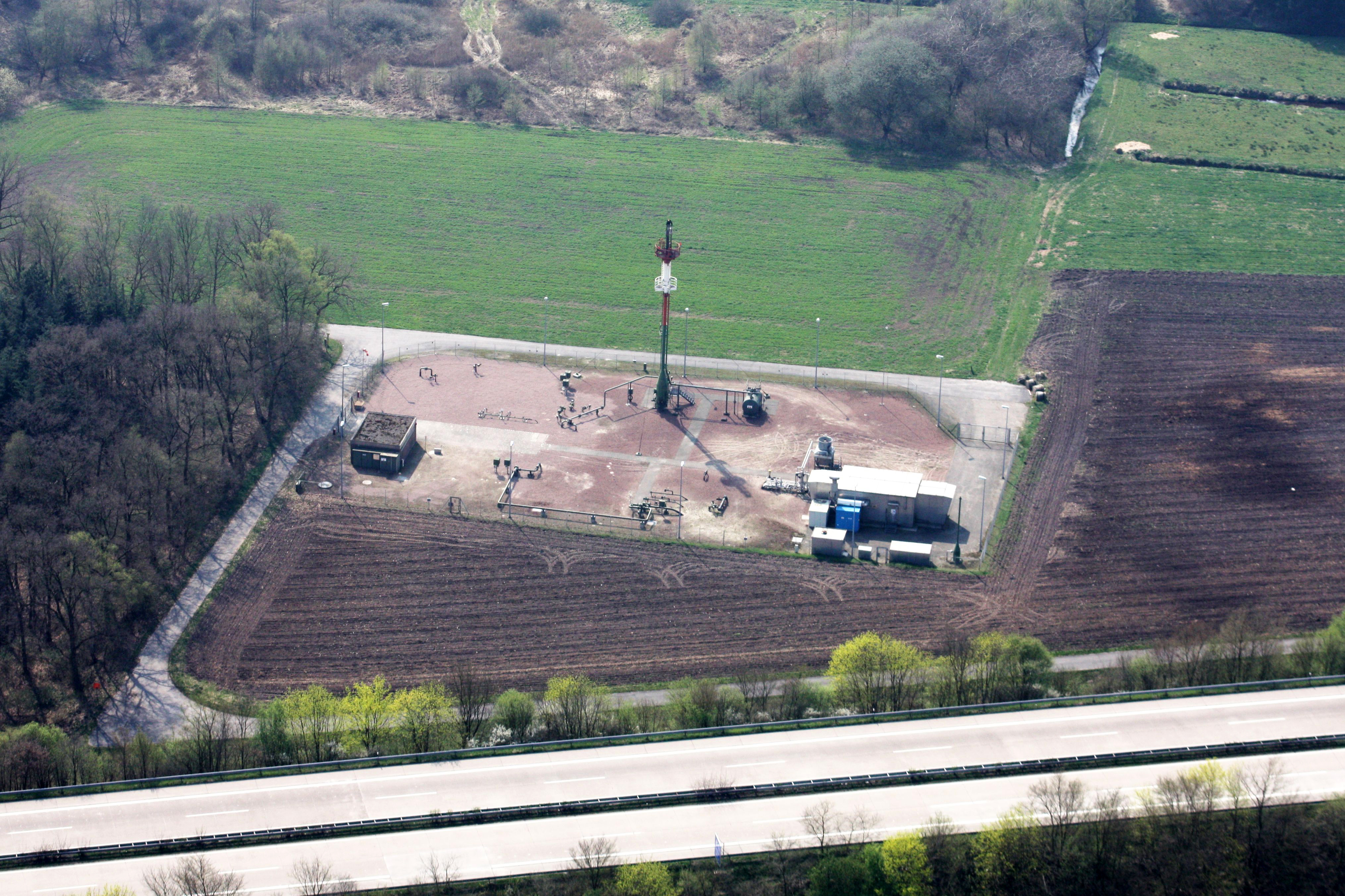 Dreieck Ahlhorner Heide und nähere Umgebung; östlich der A28 vom Dreieck Richtung Oldenburg